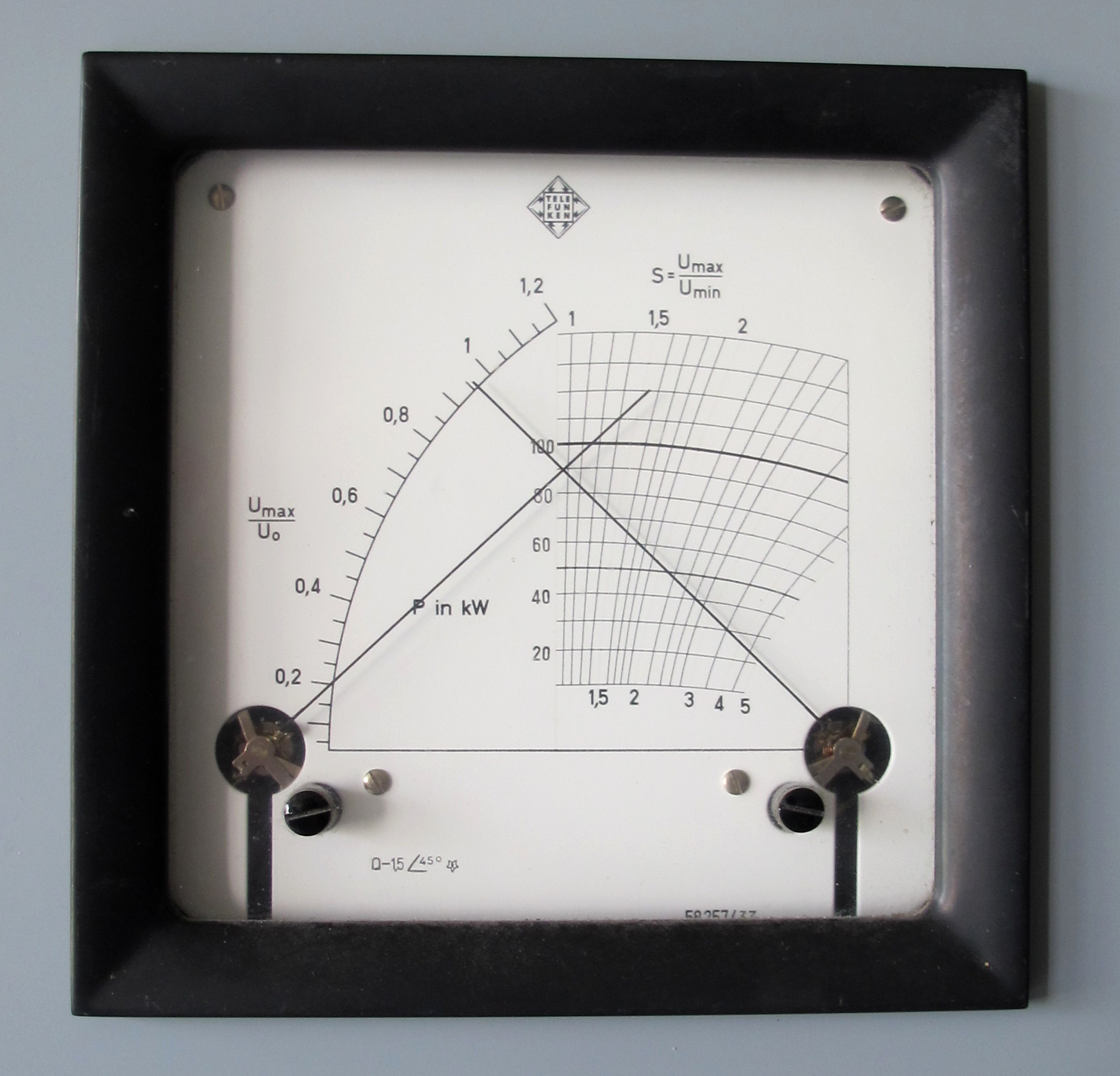 Analoges Stehwellenmessgerät (SWR) mit Kreuzzeigern bei einem 100kW-Kurzwellensender. Dargestellt bei einer momentanen Sendeleistung von ca. 90 kW. Im Schnittpunkt der beiden Zeiger kann direkt das Stehwellenverhältnis in dem rechten Skalenfeld abgelesen werden, in diesem Fall ist das SWR fast 1